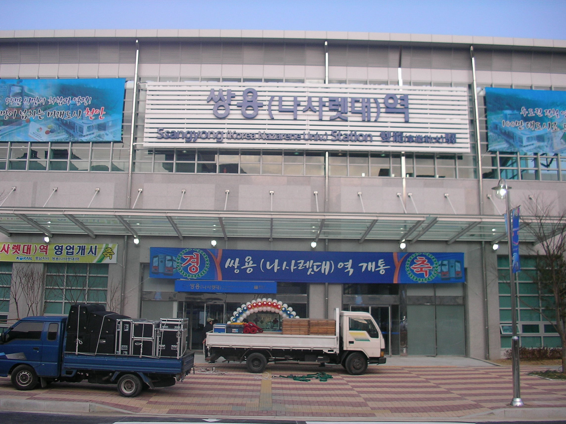 Ssangyong Station (ko en ja)